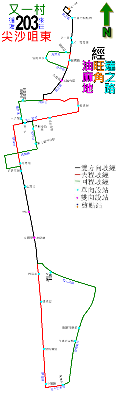 中文（香港）: 九巴203線的走線圖(2014年取消前)